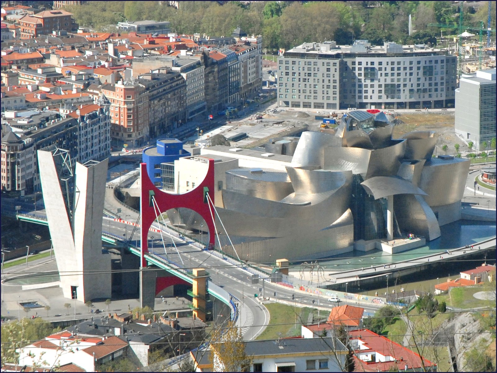 Guggenheim Bilbao Museoa, Bilbao. Bizkaia, Euskal Herria. Guggenheim Bilbao Museoa, Bilbao. Bizkaia, Basque Country.